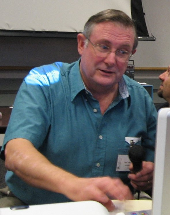 Lee Felsenstein